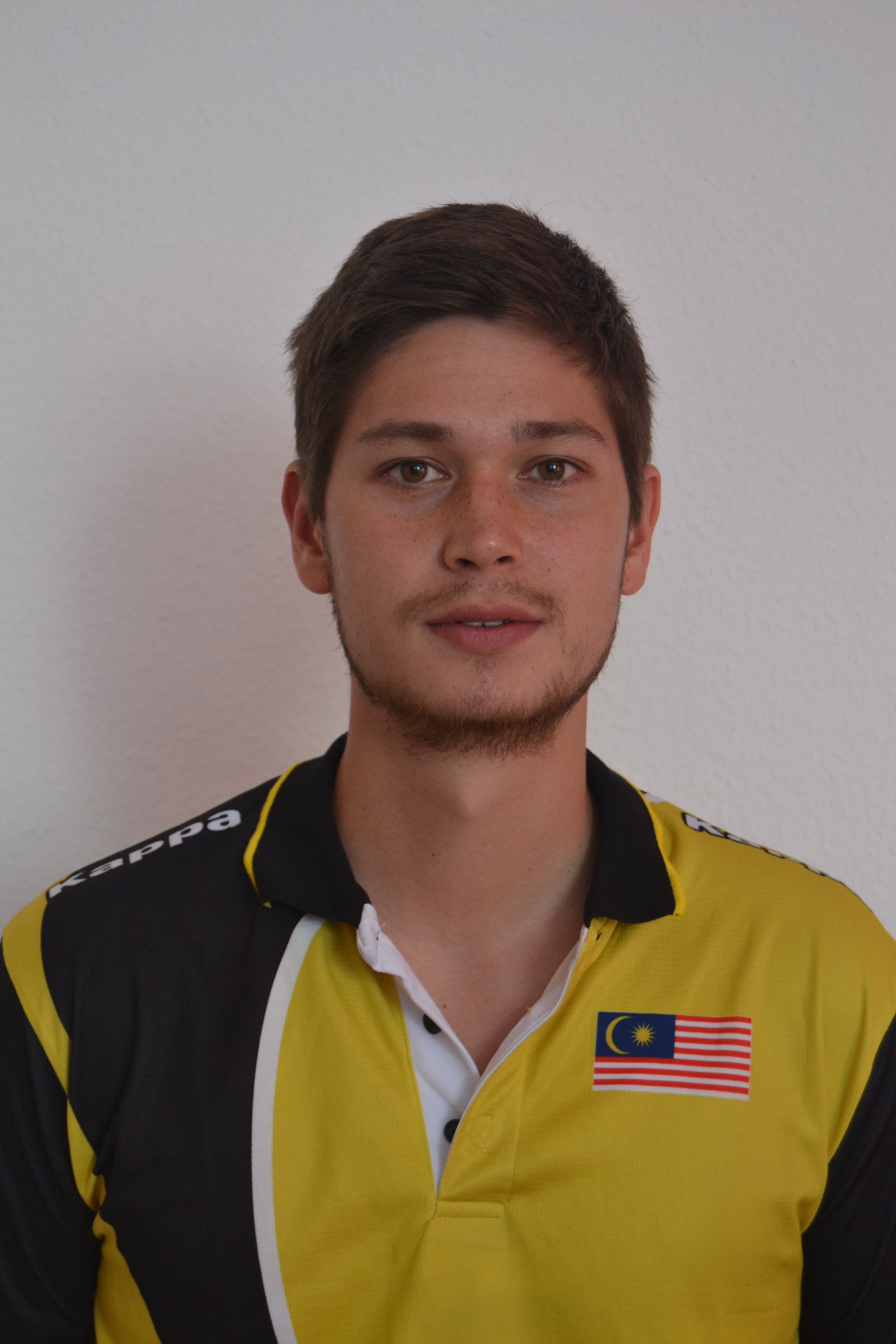 Profile Picture